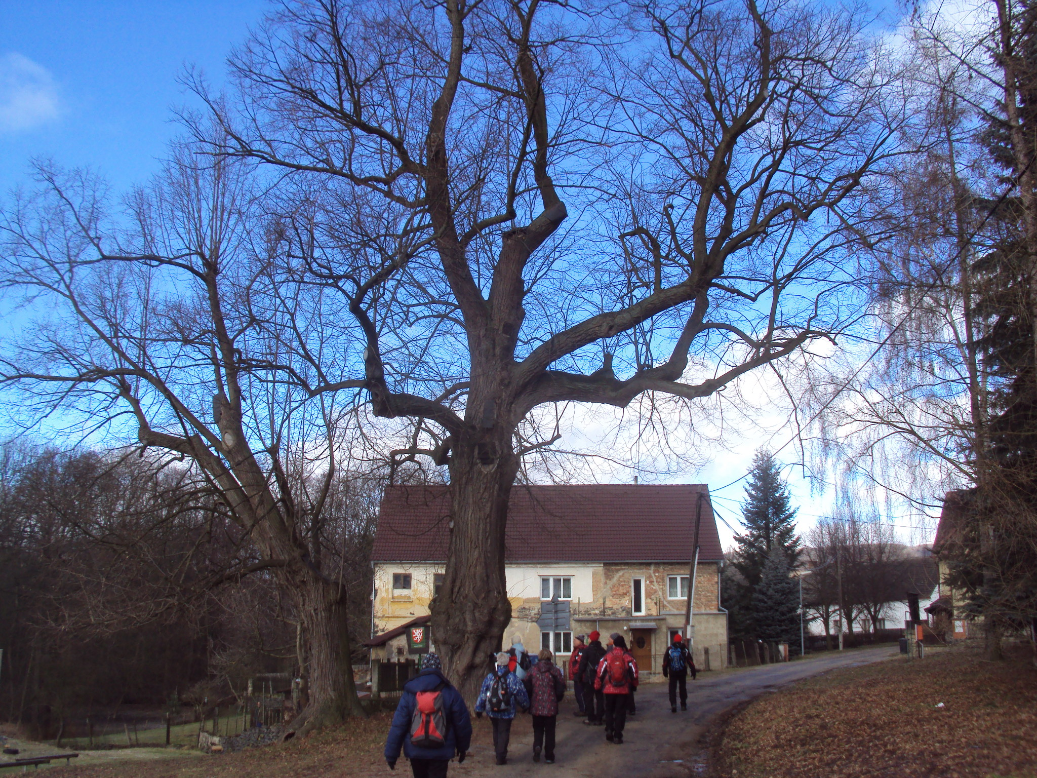 Památná lípa v Dubičné